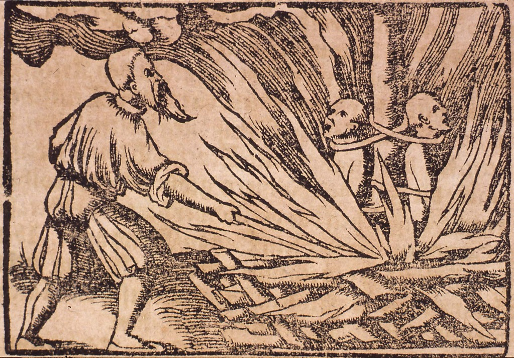 Illustration du massacre des Juifs de Sélestat en 1349. Illustration publiée en 1628, auteur inconnu.